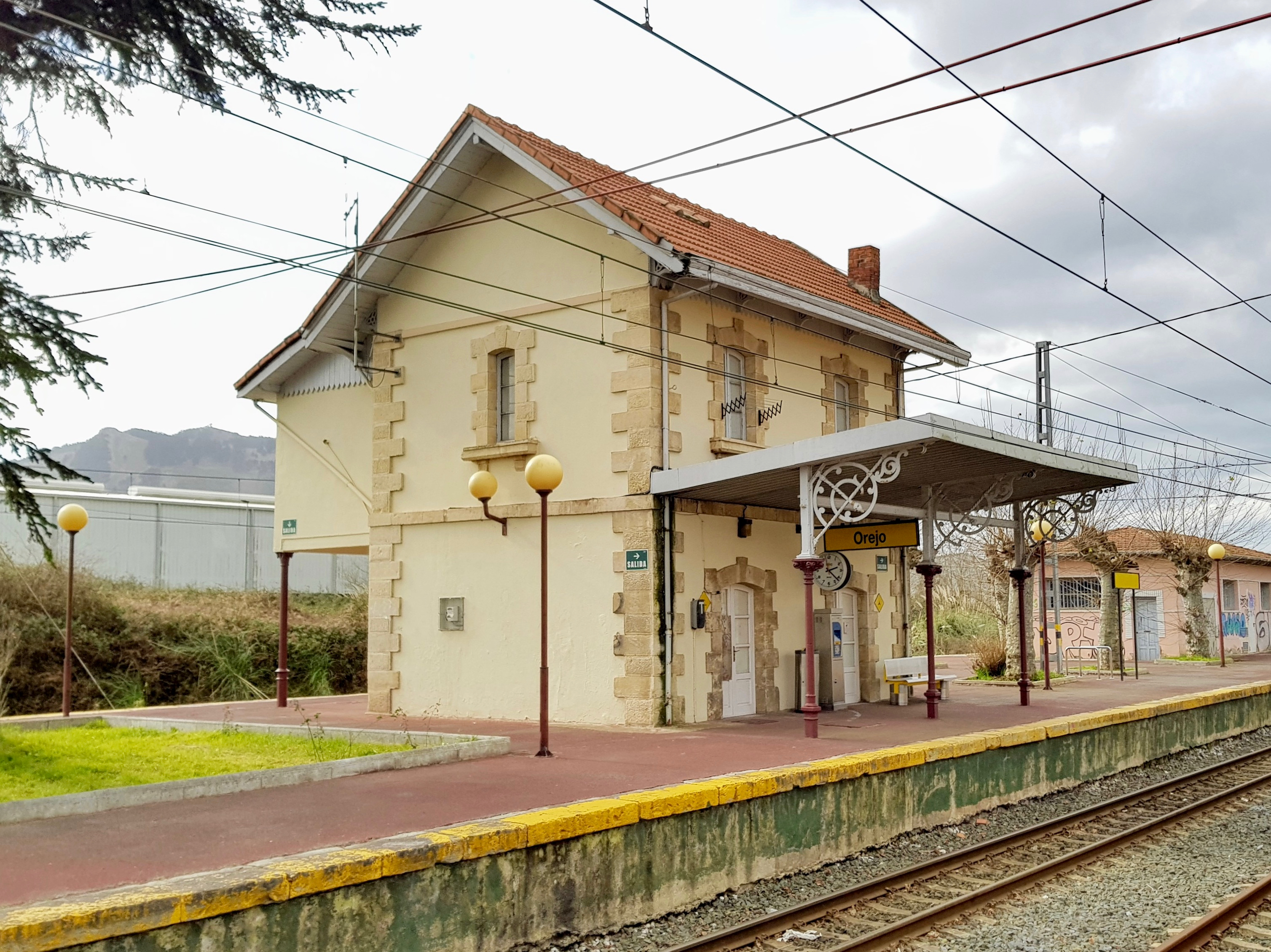 Esquina noreste del edificio de viajeros de la estación de Orejo